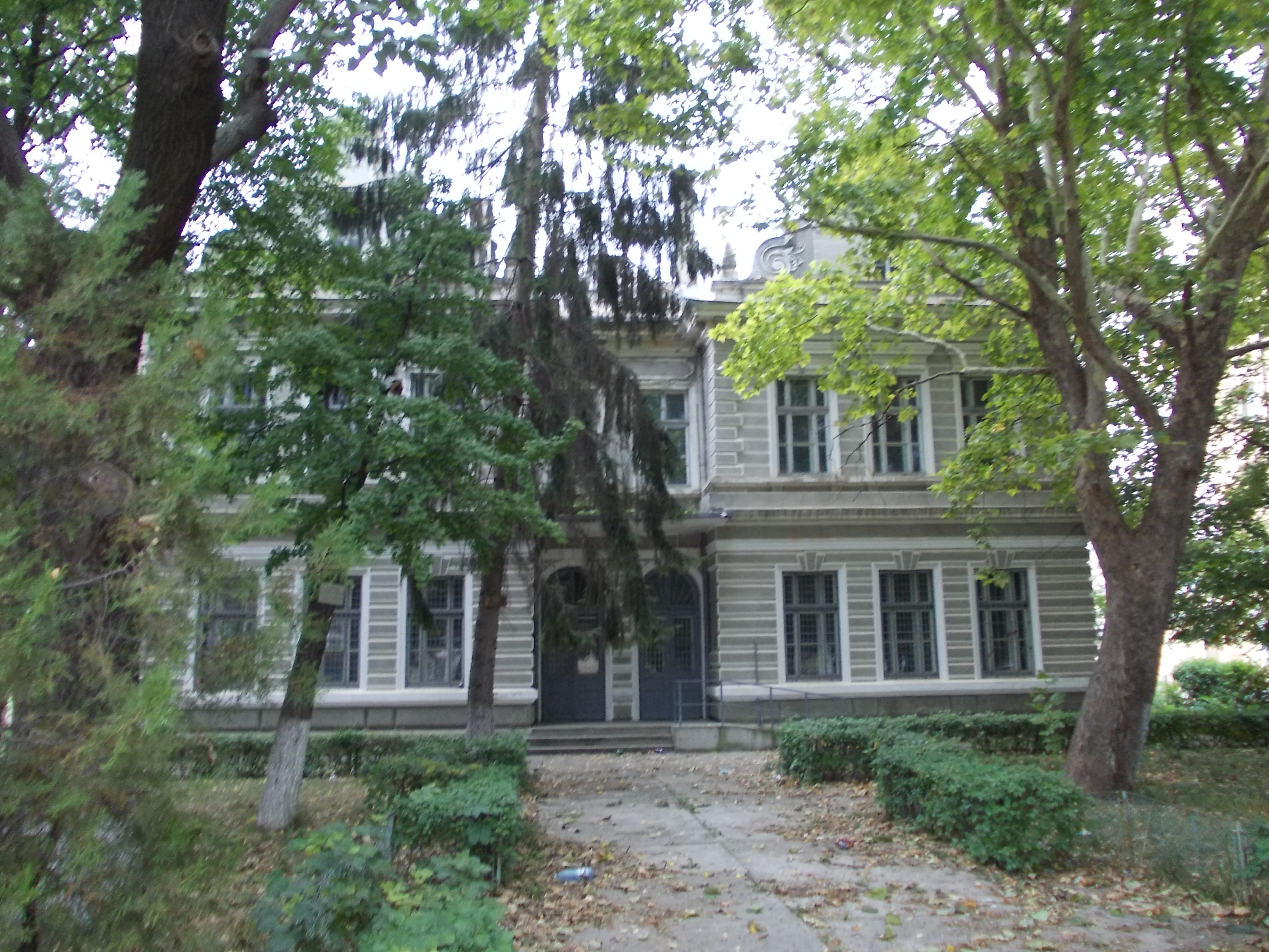 Școala armenească, azi Clubul elevilor